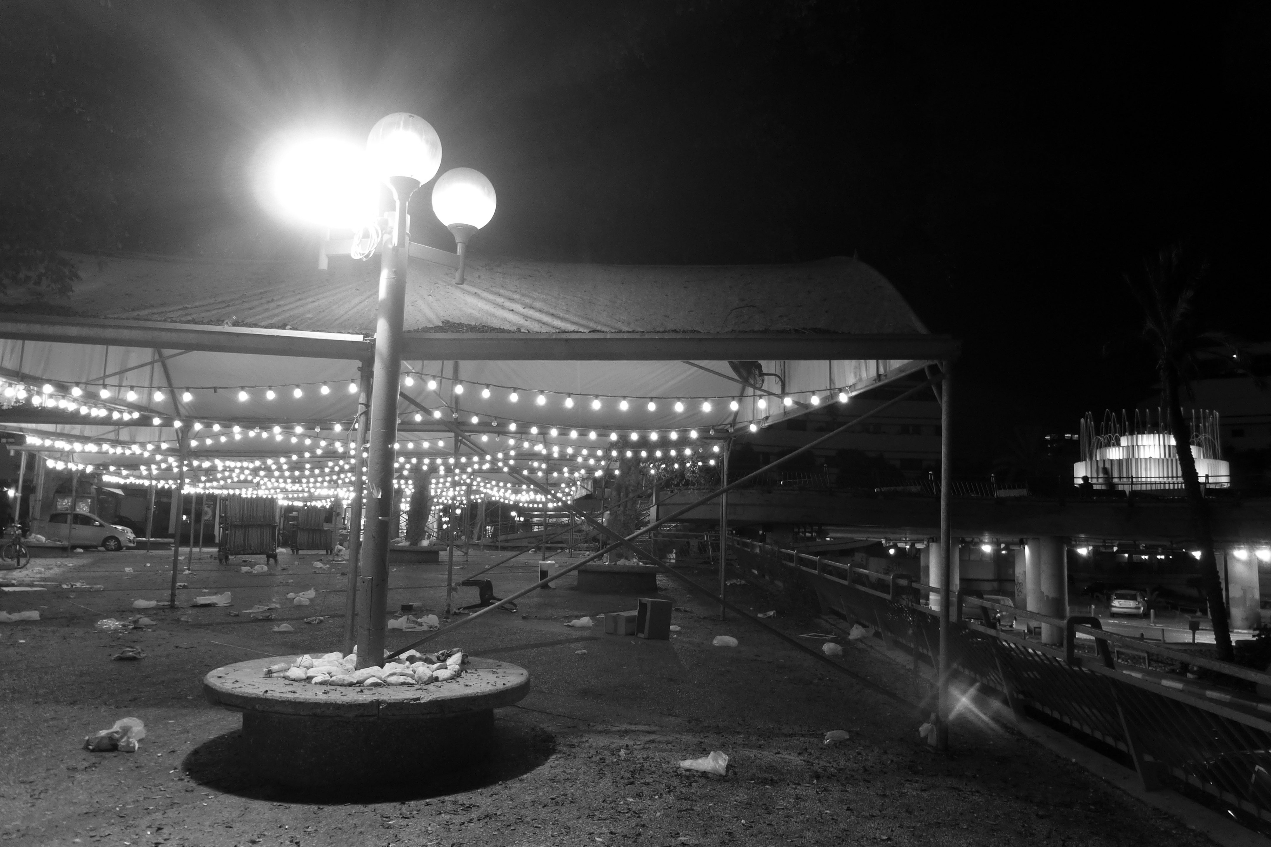 כיכר צינה דיזנגוף קרויה על שם צינה דיזנגוף, רעייתו של ראש העיר הראשון, מאיר דיזנגוף. הכיכר נחשבה במשך שנים רבות כאחד מסמליה של תל אביב. הכיכר הייתה חלק מתוכנית גדס, תוכנית מתאר לעיר תל אביב שהכין פטריק גדס, מתכנן ערים סקוטי. עיצוב הכיכר נעשה על ידי האדריכלית ג'ניה אוורבוך, שזכתה בתחרות העיצוב של הכיכר בשנת 1934. התכנון היה על פי קריטריונים של הסגנון הבינלאומי, שהיה הסגנון האדריכלי המרכזי בתל אביב בתקופה זו.